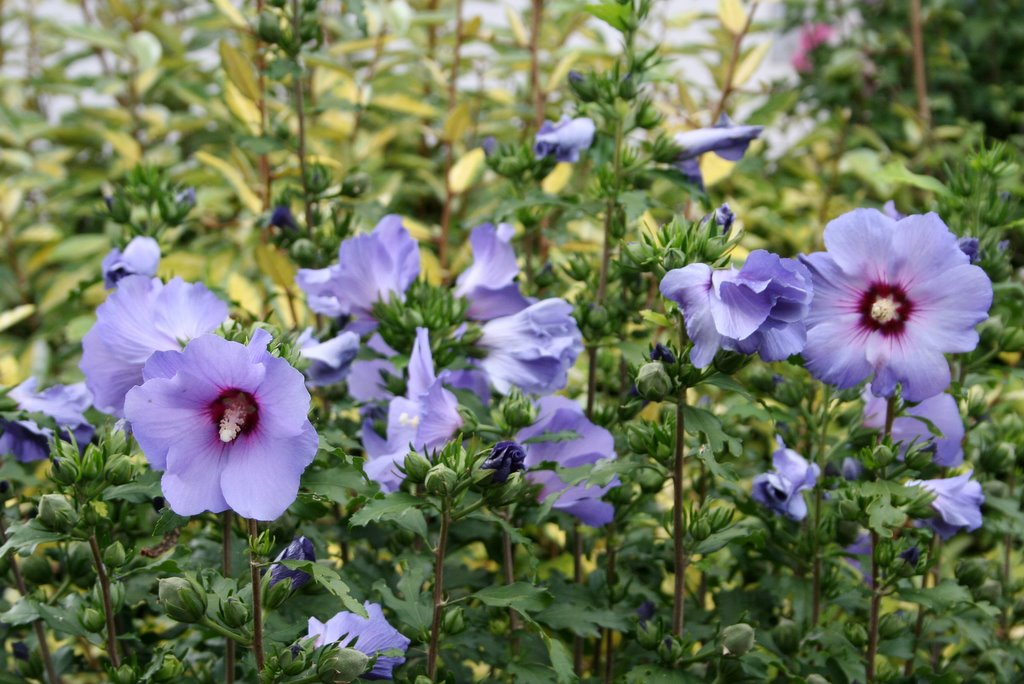 Hibiscus siriatus - Blue bird (Oimeau bleu)